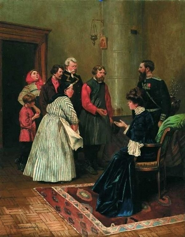 Илларион Прянишников Пасха 1885 г.